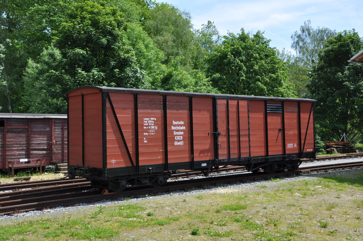 Güterwagen der Schwarzbachbahn im Bahnhof Lohsdorf